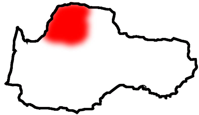 Pichòta mapa del dialecte lemosin Little map of lemosin dialect